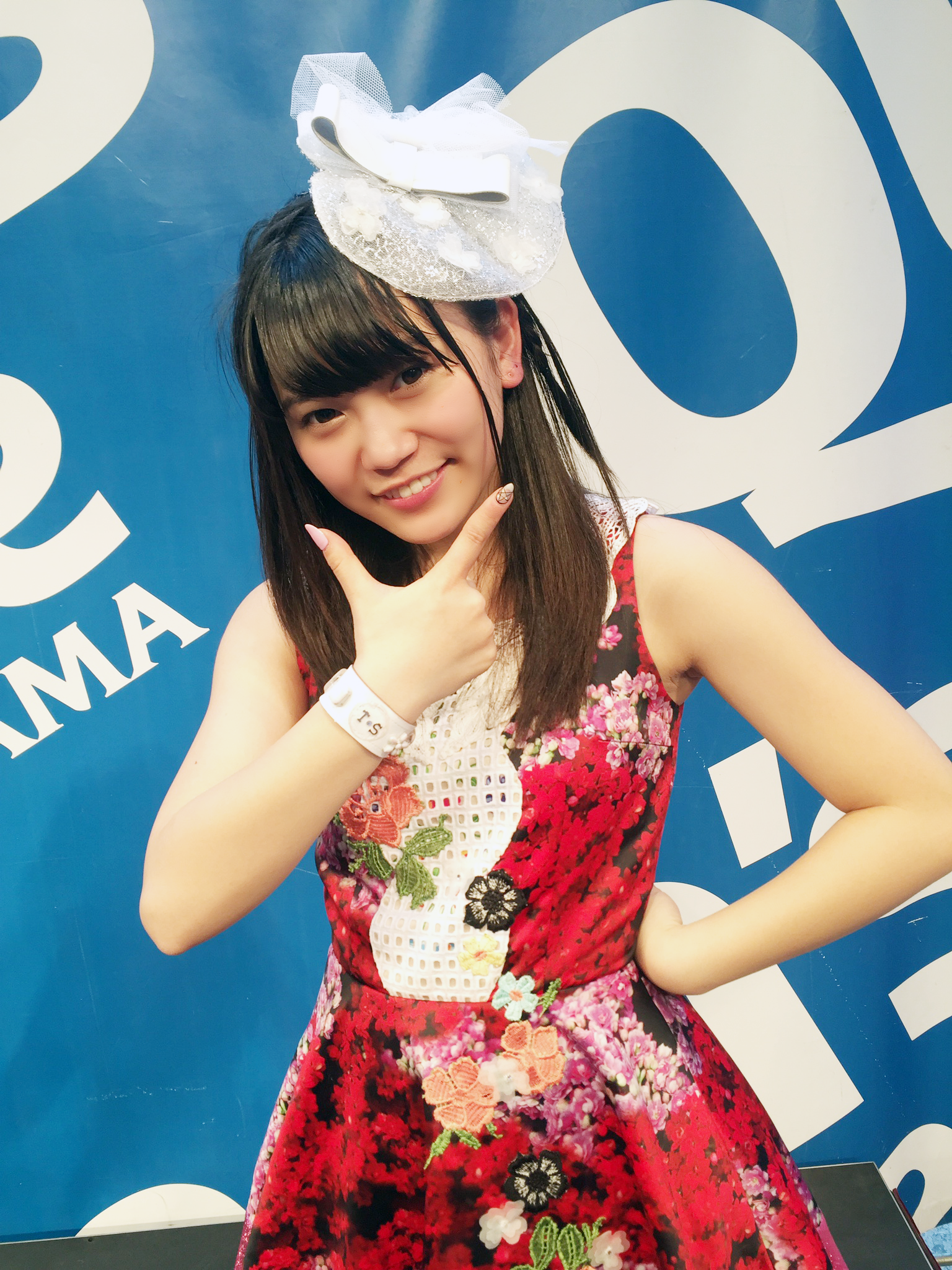 2016年2月13日 クイーンズスクエア横浜にて